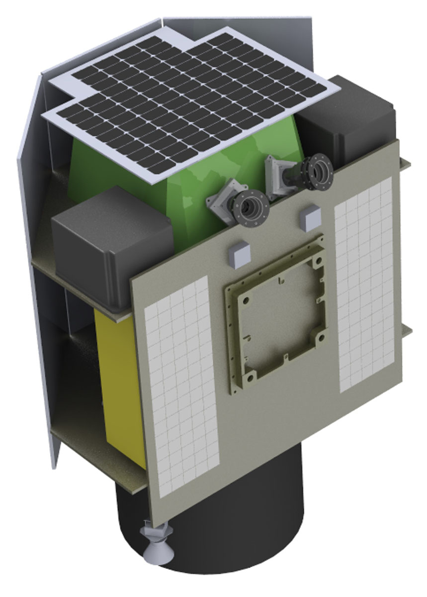 Микроспутниковая платформа СПУТНИКС